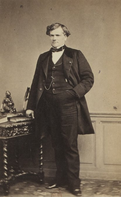 Emile Rigaud, maire d'Aix-en-Provence, entre 1852 et 1857